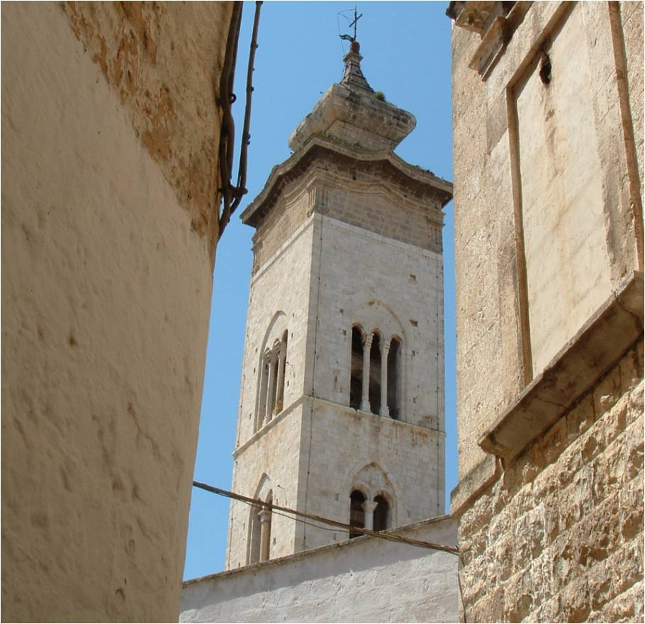 Rutigliano: campanile romanico della Collegiata di Santa Maria della Colonna e San Nicola.